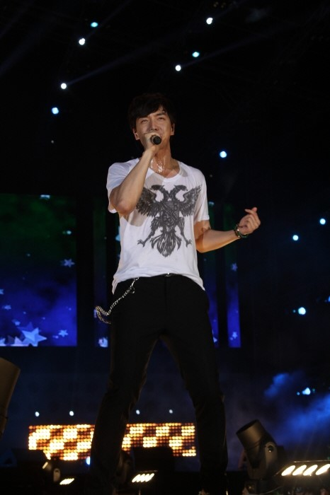 가수 이승기